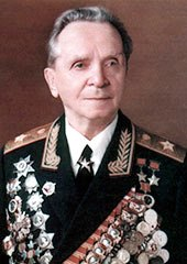 Павел Иванович Батов (1897 — 1985) — советский военный деятель, Генерал армии